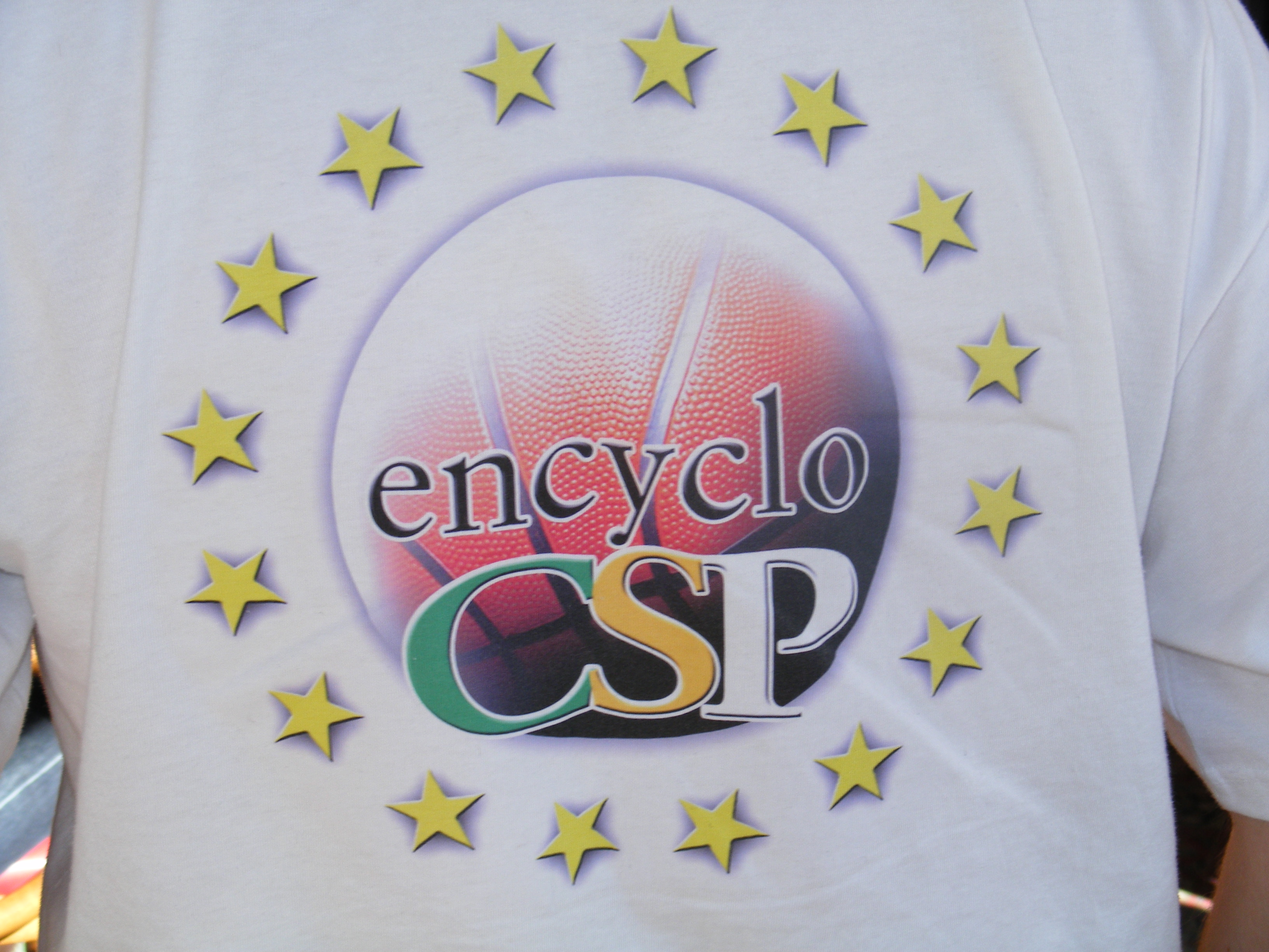 T-shirt représentant le logo d'EncycloCSP.